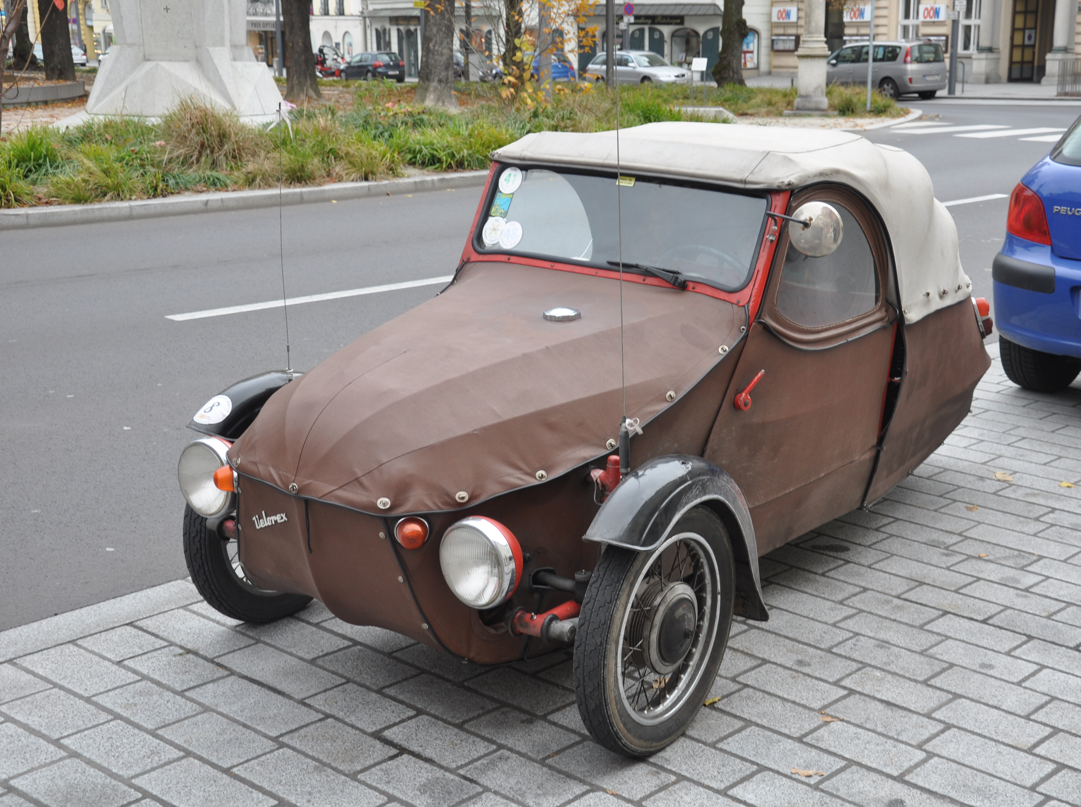 Linz, unidentified Velorex vehicle, seen at Promenade, Linz, in 2010